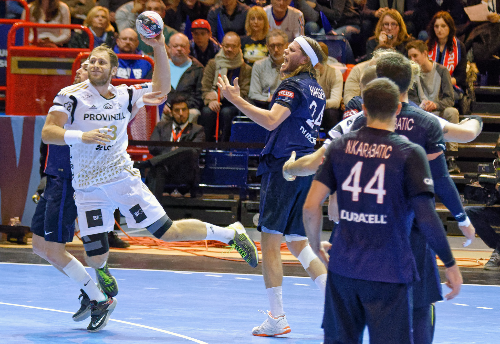 Rencontre de phase de groupe de ligue des champions 2015-16 entre le PSG et le THW Kiel. A la Halle Carpentier (Paris), le 22 novembre 2015.